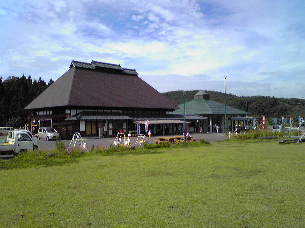 Ryokan-no-sato Washima, Roadside Station, Japan.